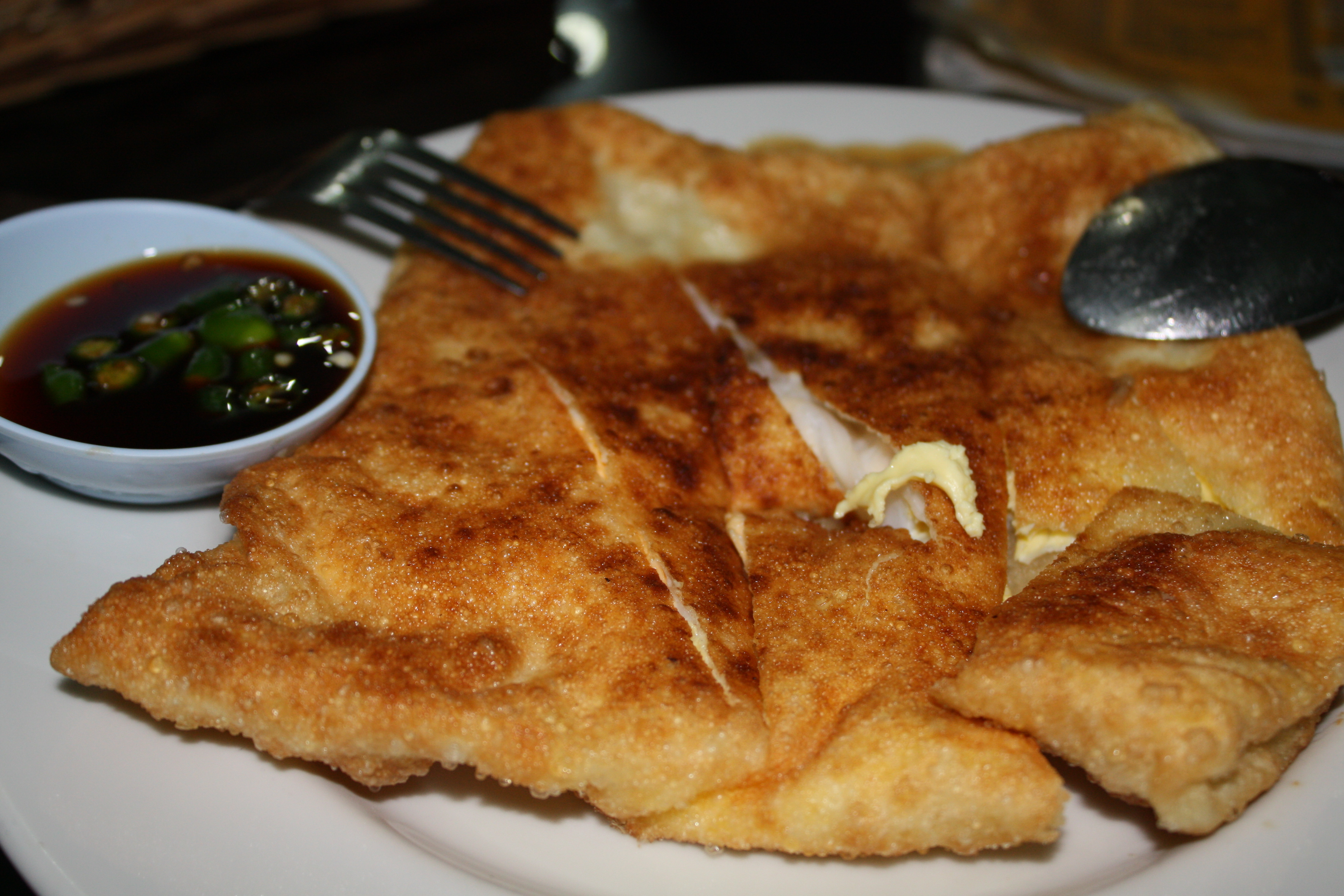 Martabak Har Palembang